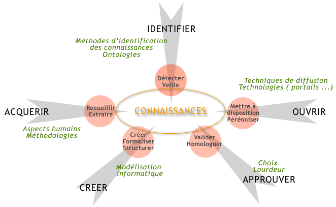 Gestion des connaissances sur P4LM